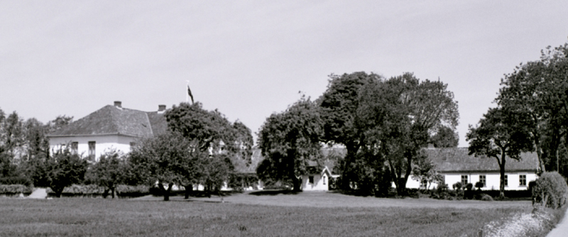 Nes manor, Fredrikstad, Norway.